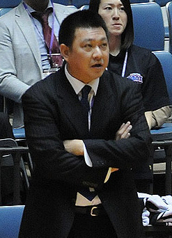 サイバーダインつくばロボッツ、平岡富士貴HC。代々木第一体育館で。